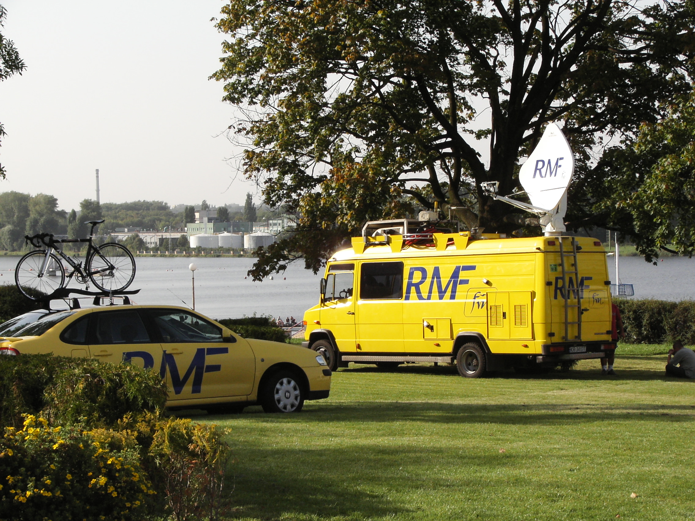 Wóz reporterski-satelitarny RMF FM, Poznań-Malta Tour de Pologne 2006.